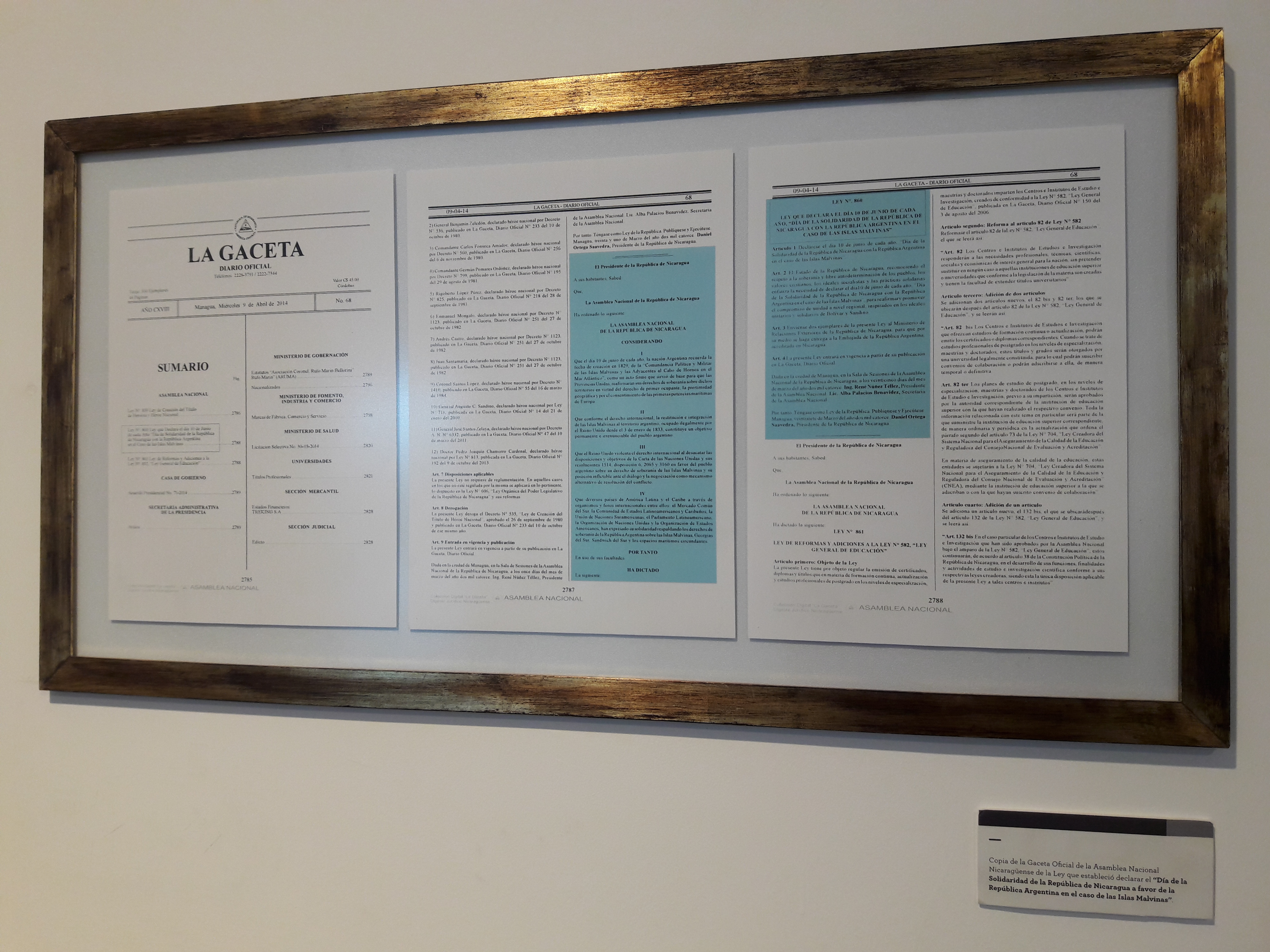 Texto de La Gaceta Oficial del Gobierno de Nicaragua declarando el 10 de junio como "Día de Solidaridad con Argentina por el caso de las Islas Malvinas". Museo Malvinas, Núñez, Buenos Aires, Argentina.